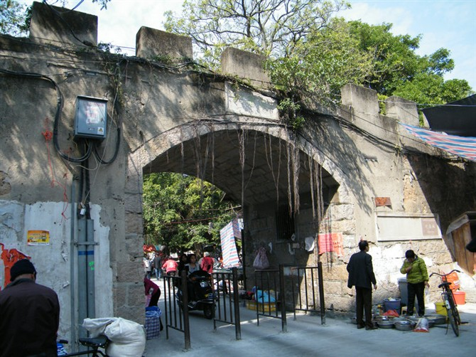 达濠城东门